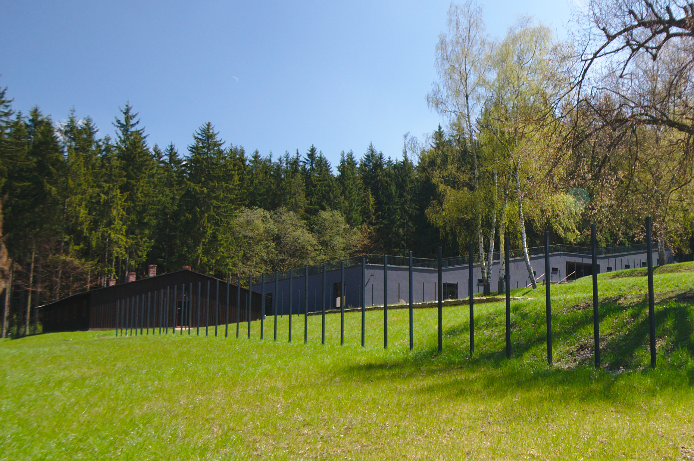 Koncentrační tábor Hodonínek, Hodonín, okres Blansko